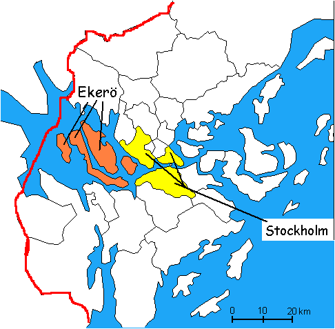 Ekerö in Sweden